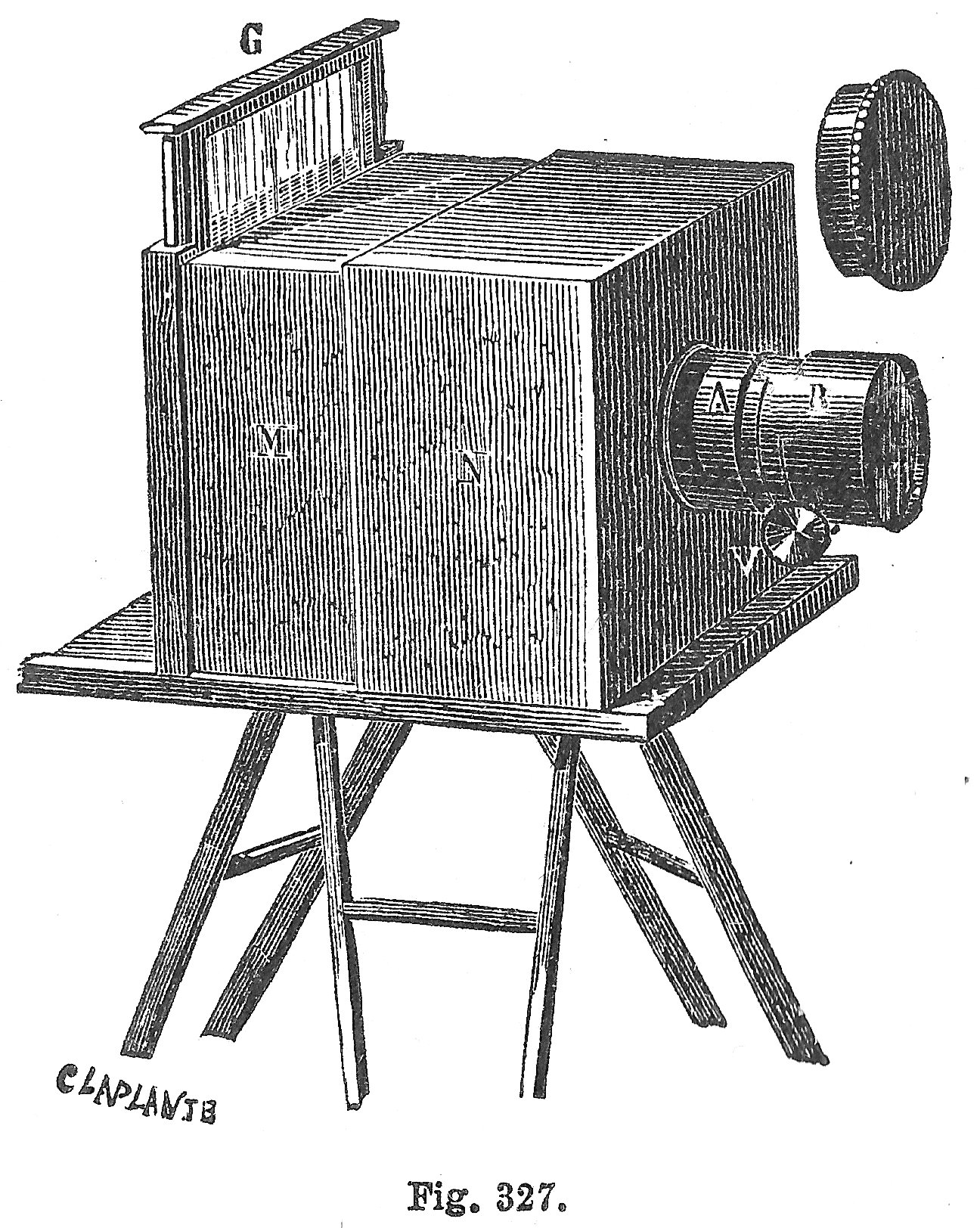 Daguerrotipo Drawing/dibujo: Daguerreotipo La imagen parece firmada por: Claplante Comments